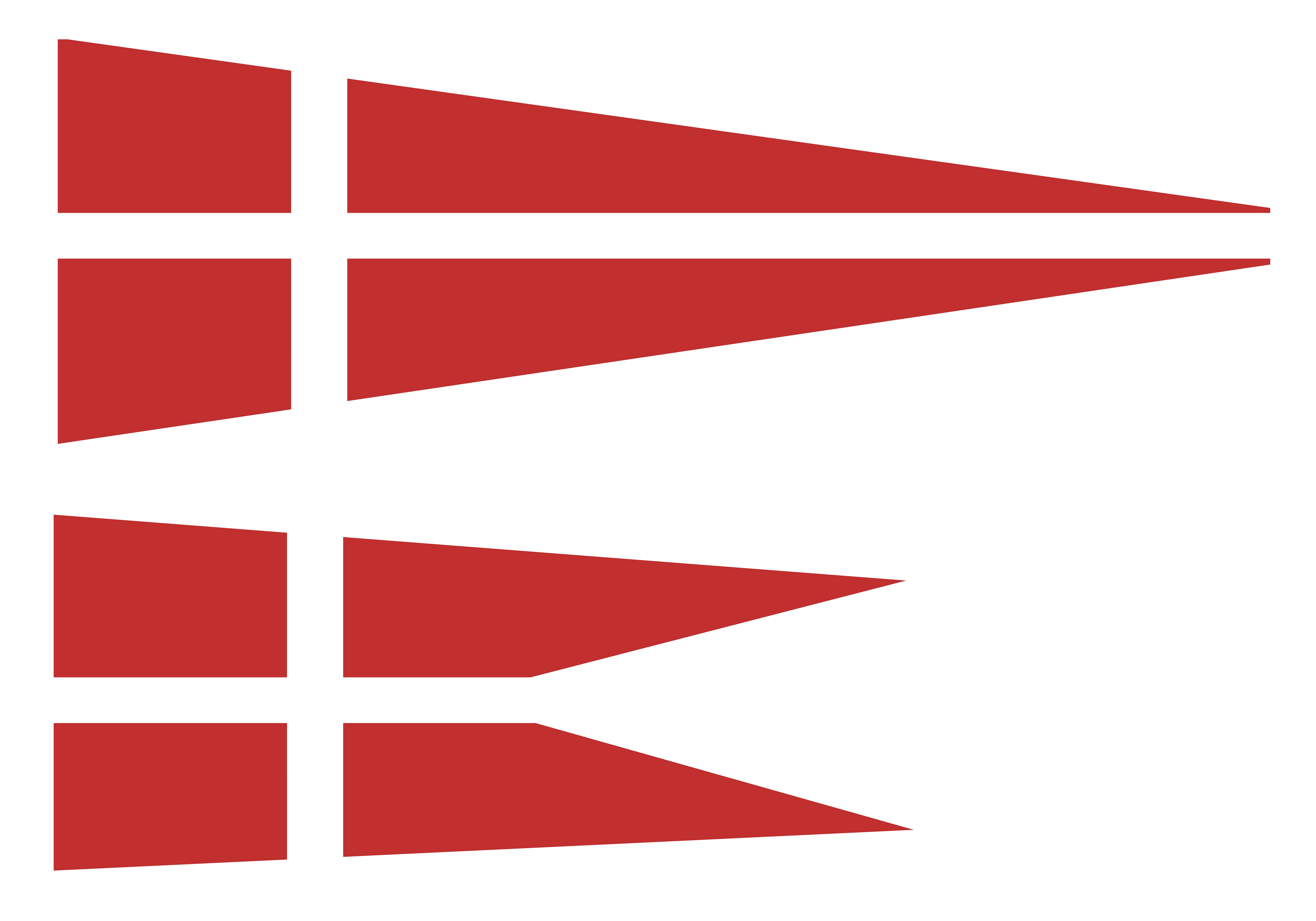 Zwei im Laufe der Jahrhunderte benutzte Flaggen der Marine des Malteserordens